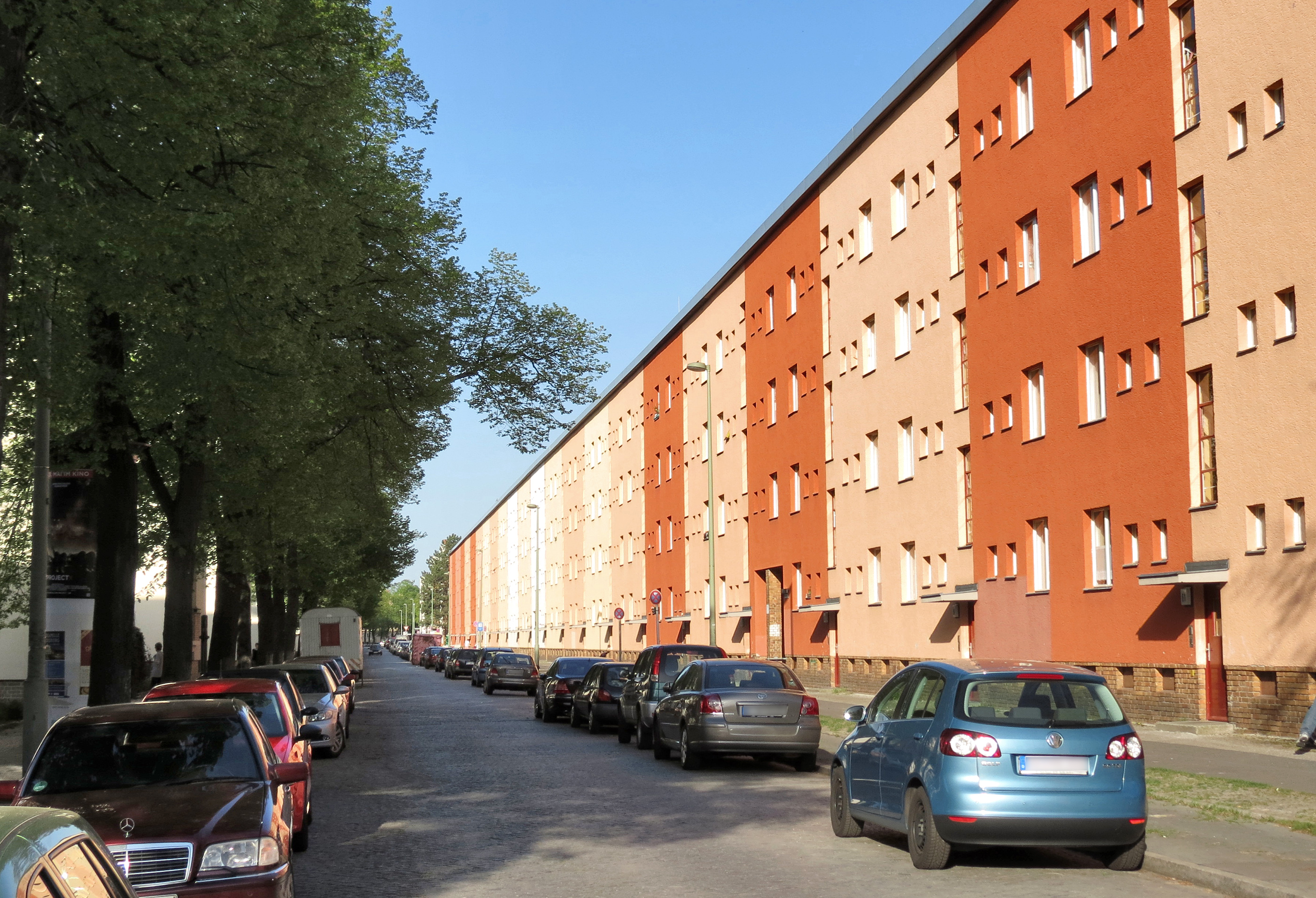 Burscheider Weg (Berlin-Haselhorst)